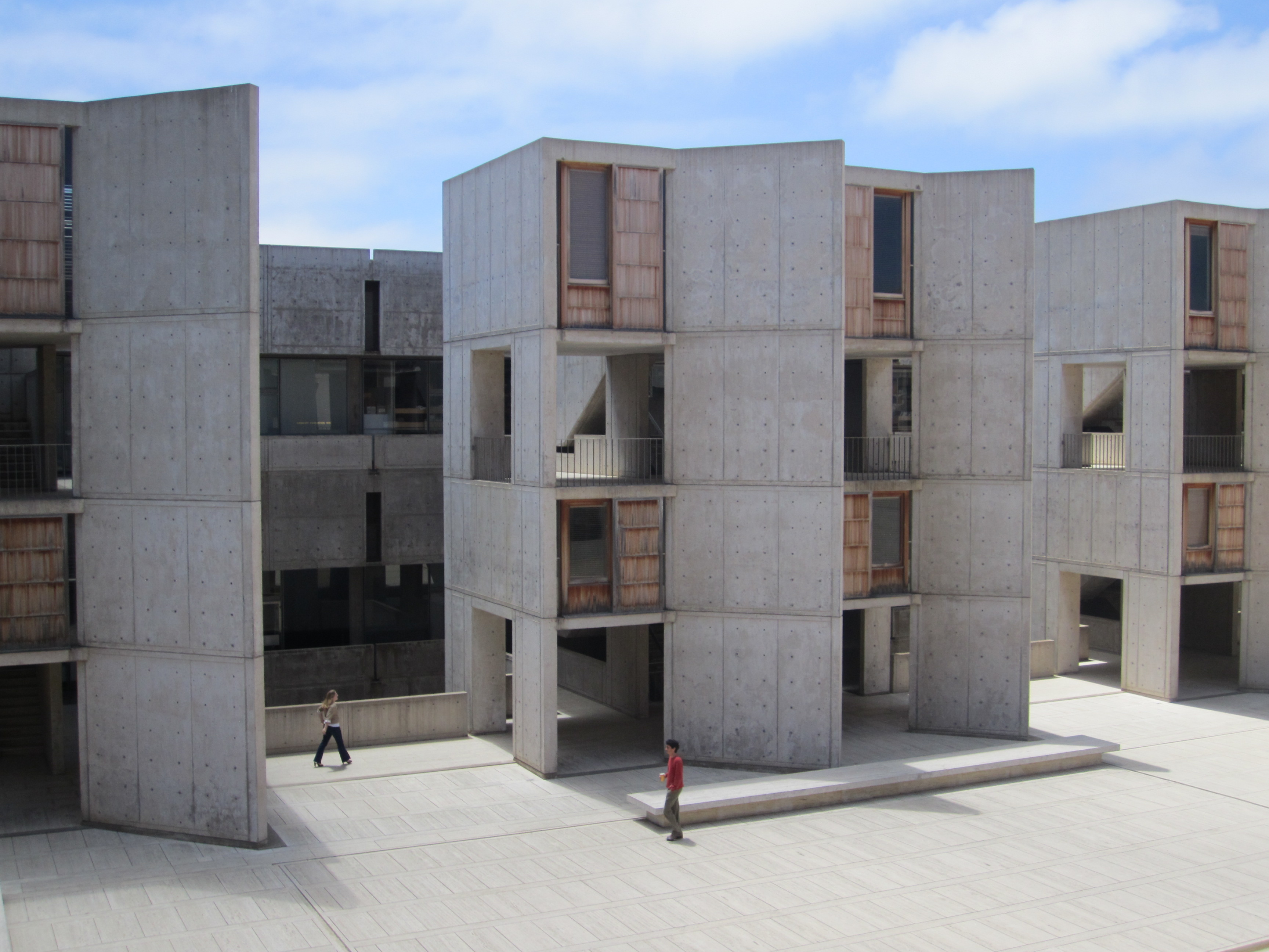 Salk Institute in San Diego by Louis Kahn